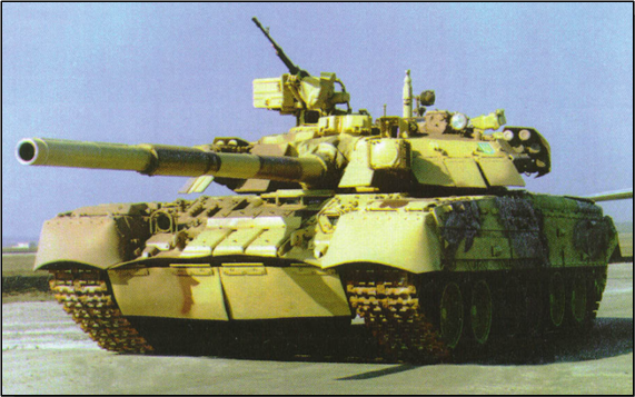 Танк Т-84 призначений для посилення механізованих підрозділів у всіх видах загальновійськового бою, прориву укріплених позицій, знищення вогневих точок, техніки і живої сили противника, швидкої організації оборонних рубежів.